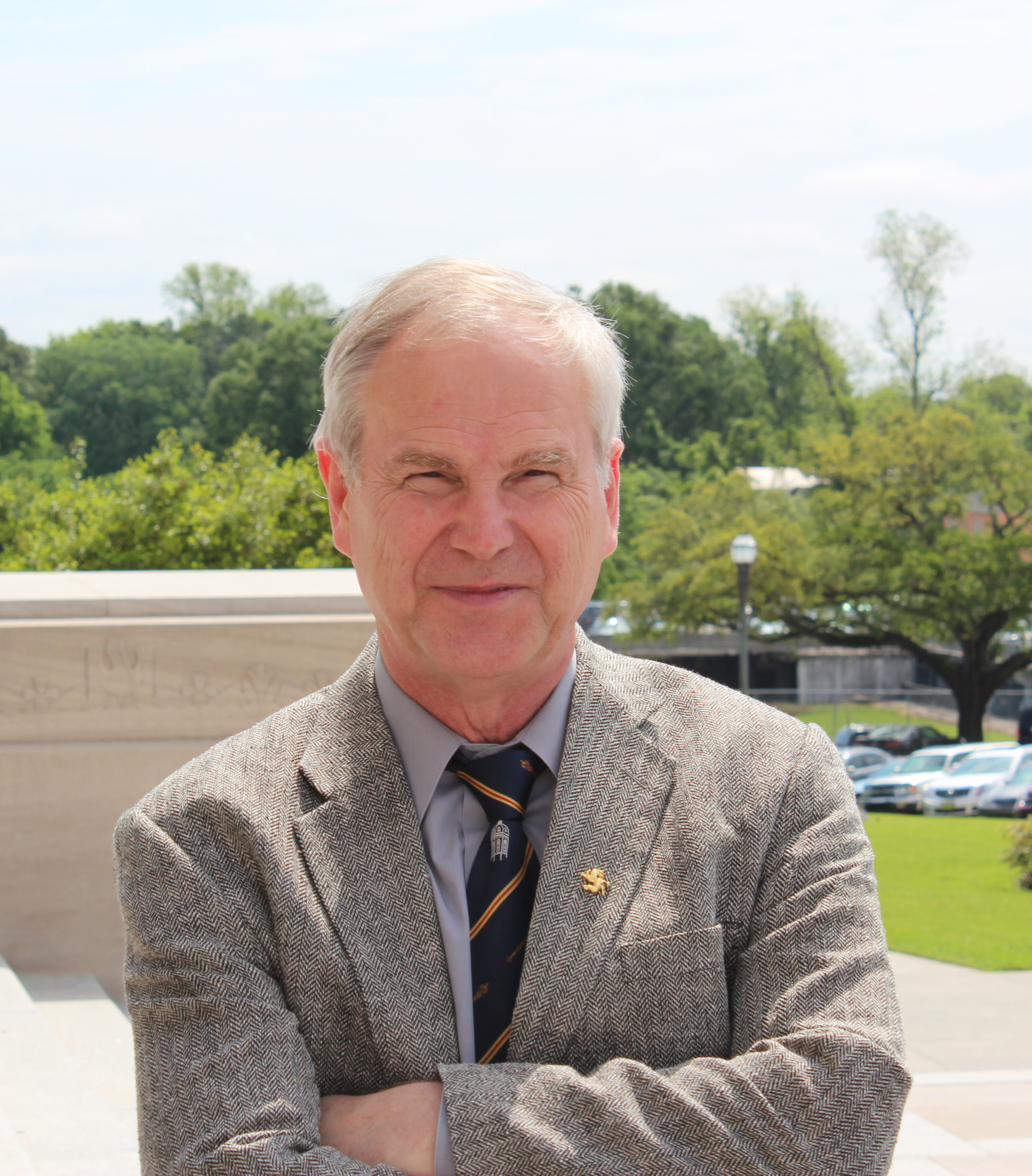 Monsieur Philippe Gustin, nommé Ambassadeur de Namur suite à son investissement dans les rapports entre Namur et Lafayette à l’occasion du 35e anniversaire du jumelage entre les deux villes.